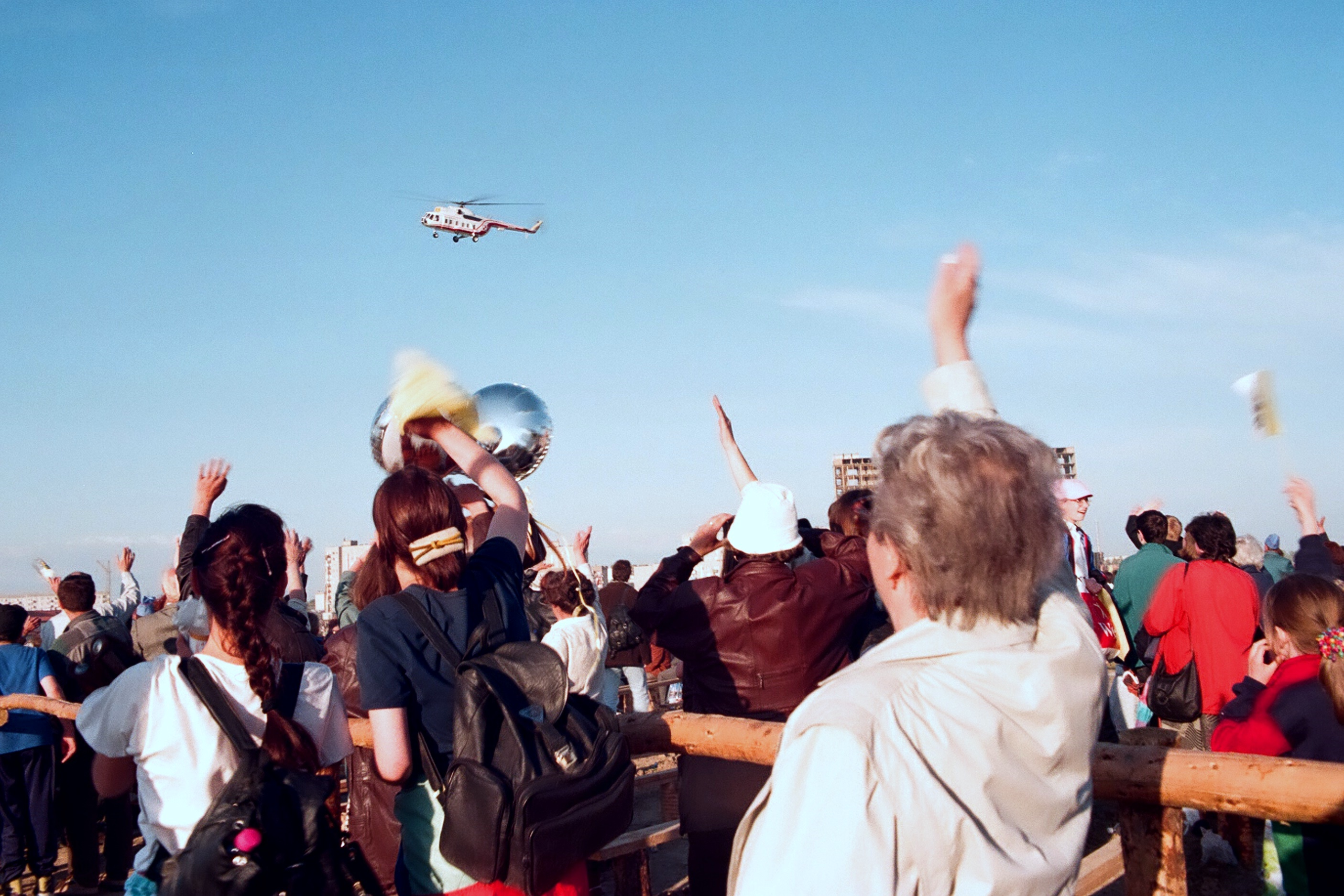 VI pielgrzymka Jana Pawła II do Polski. Gorzów Wlkp., 2. 06. 1997 r. Śmigłowiec z Papieżem na pokładzie odlatuje do Gniezna.